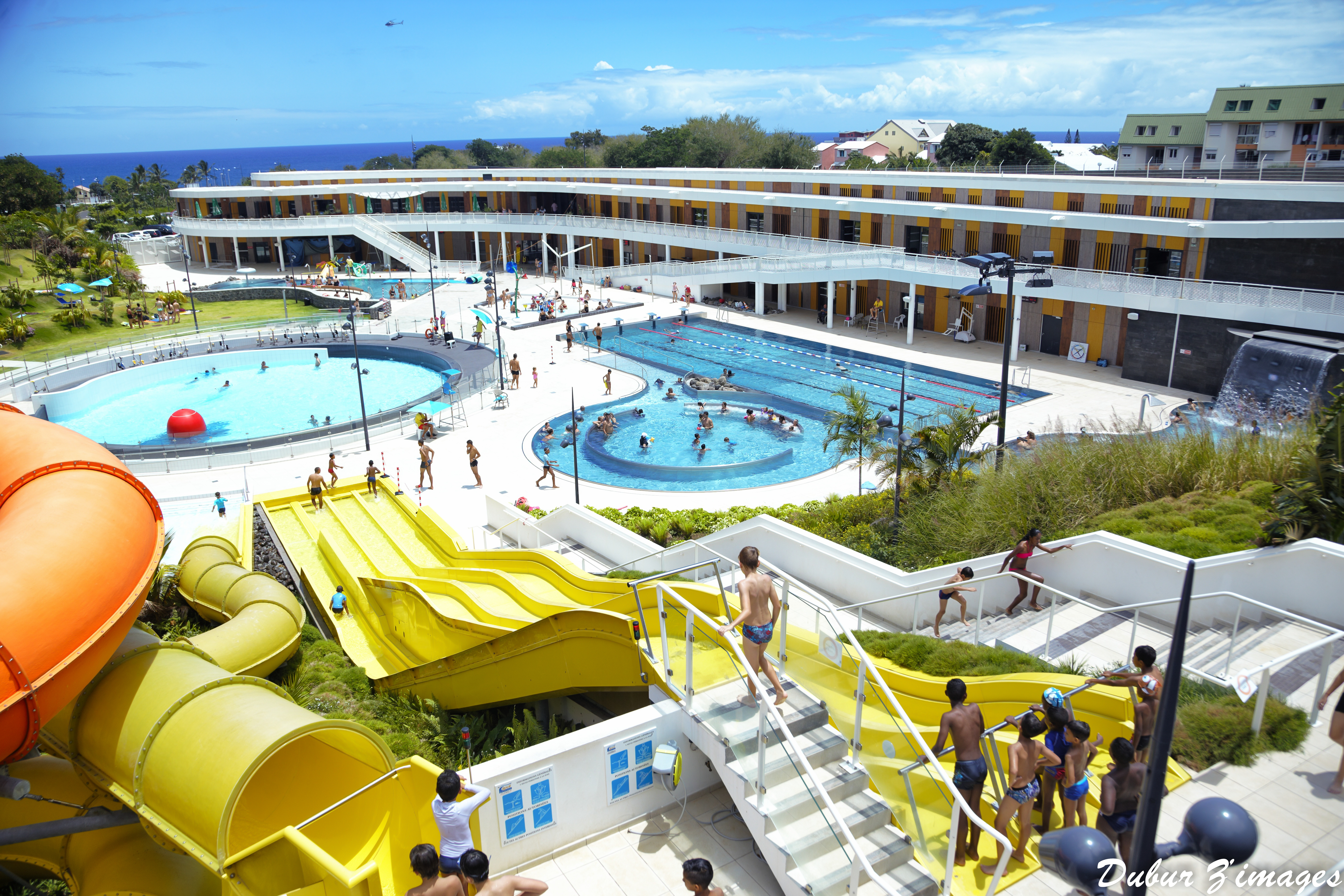 Aquanor